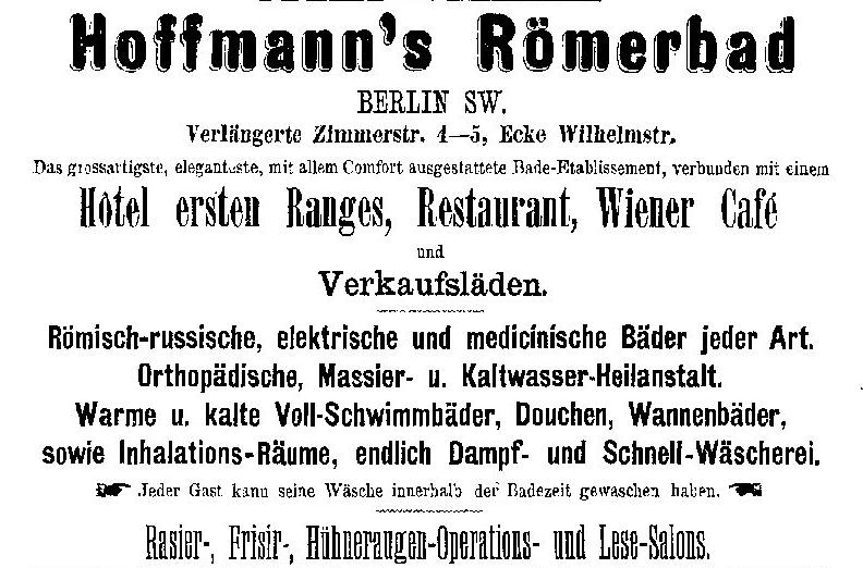 Anzeige des Hotels "Römerbad" im Berliner Adressbuch von 1888. (Online-Ausgabe: S. 1316).